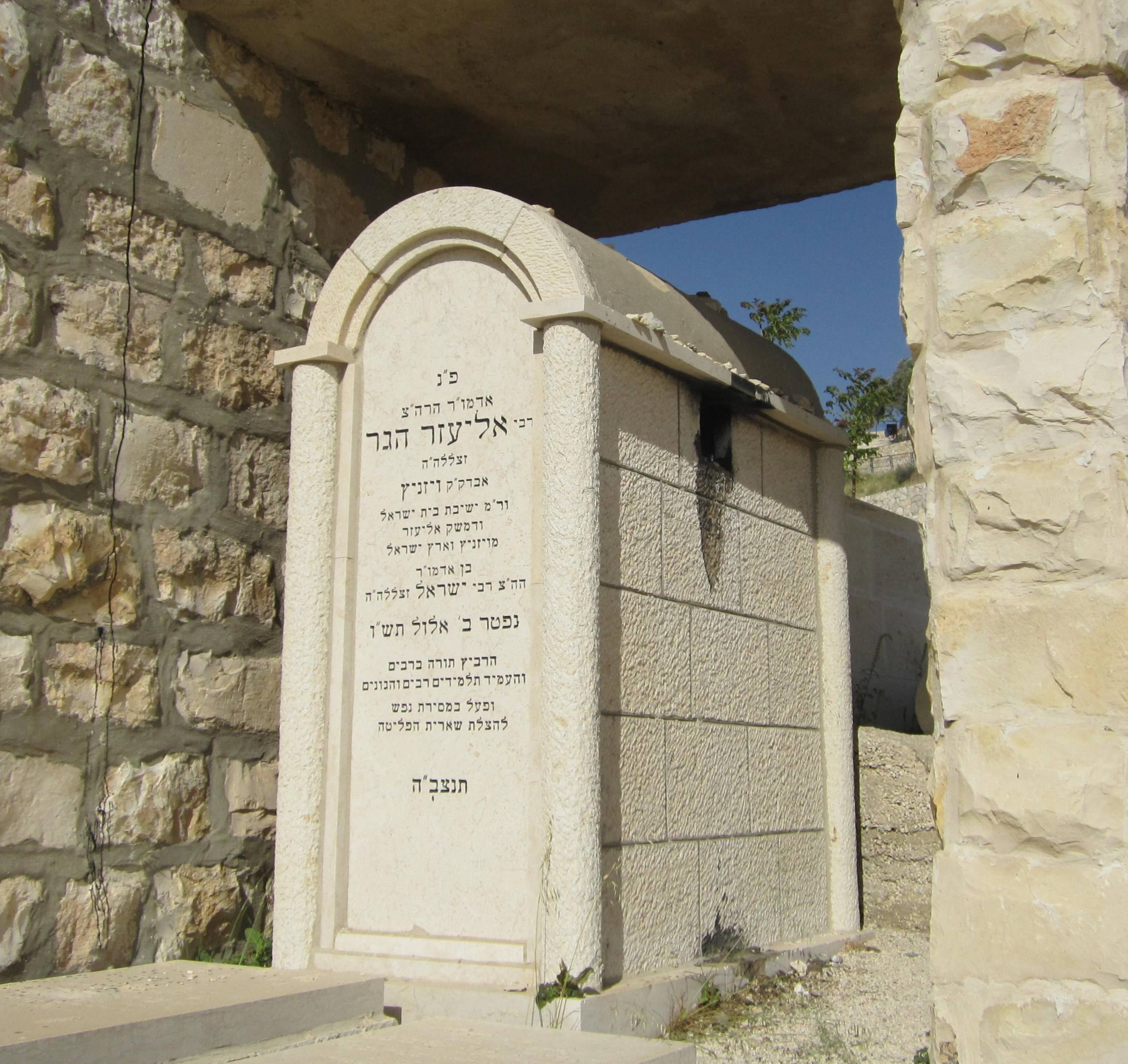 קברו של האדמו"ר רבי אליעזר הגר מויזניץ' בעל דמשק אליעזר, בהר הזיתים